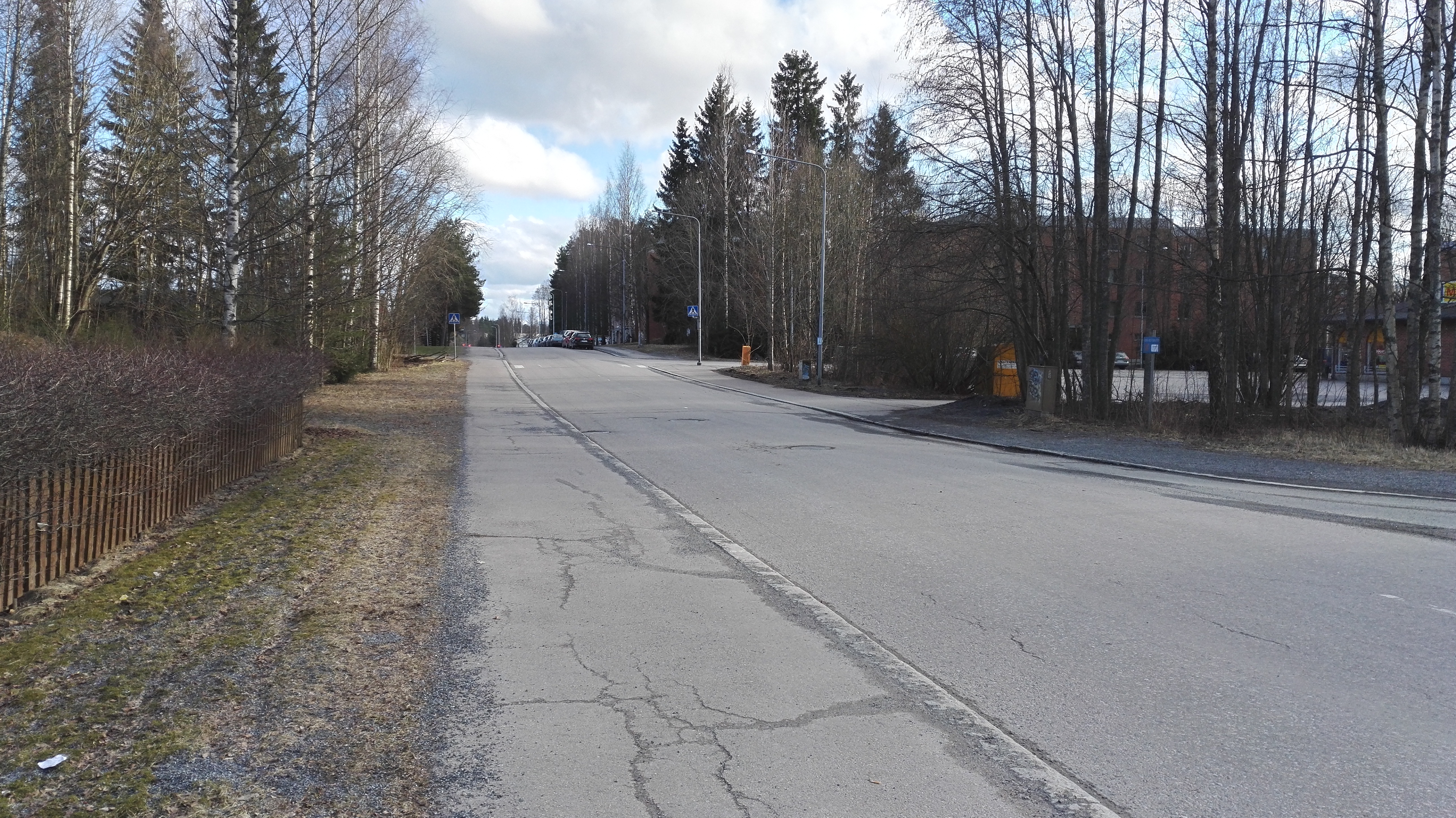 Tyvikatua Tampereen Haukiluomassa